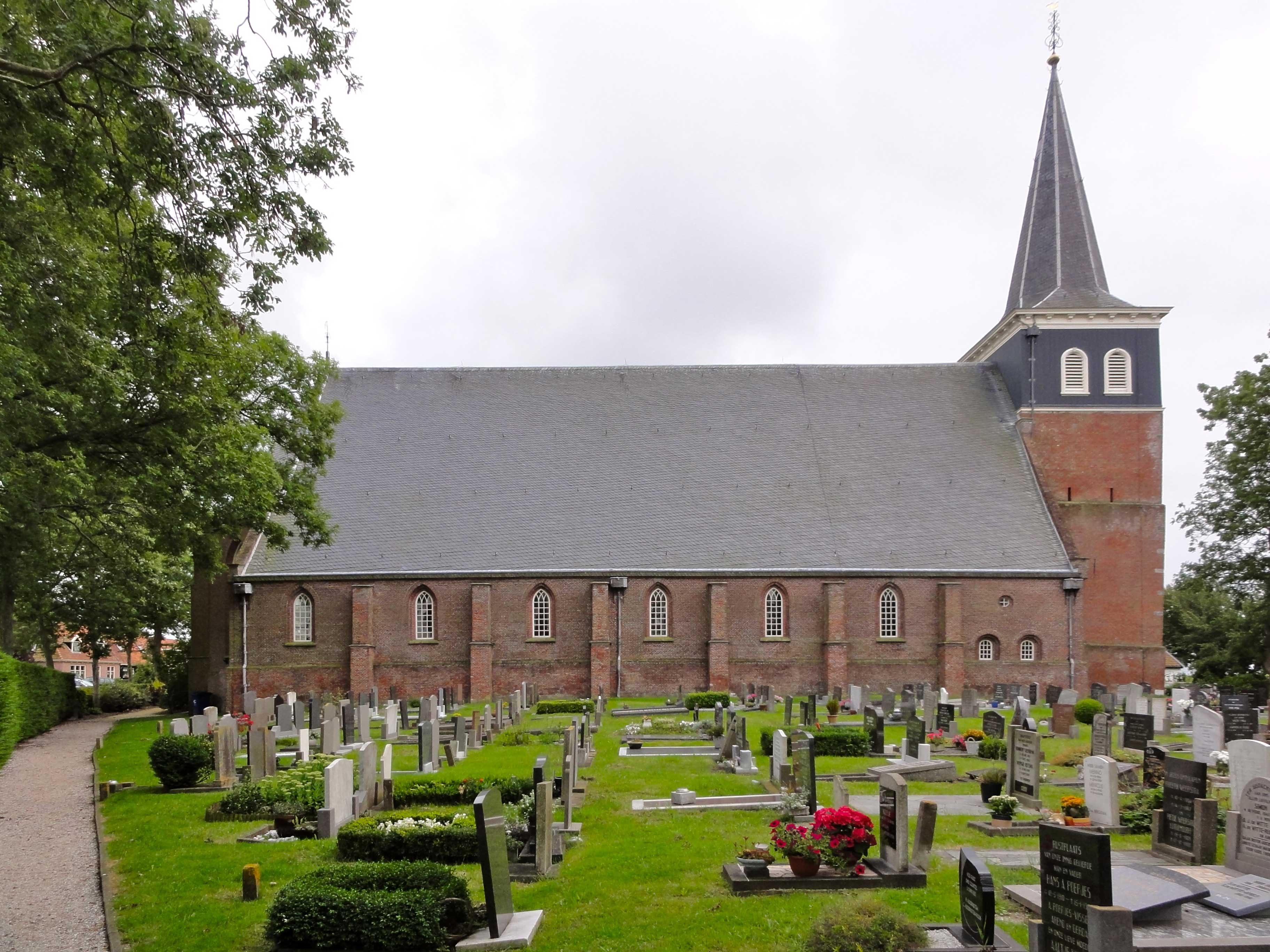 Hervormde kerk van Makkum